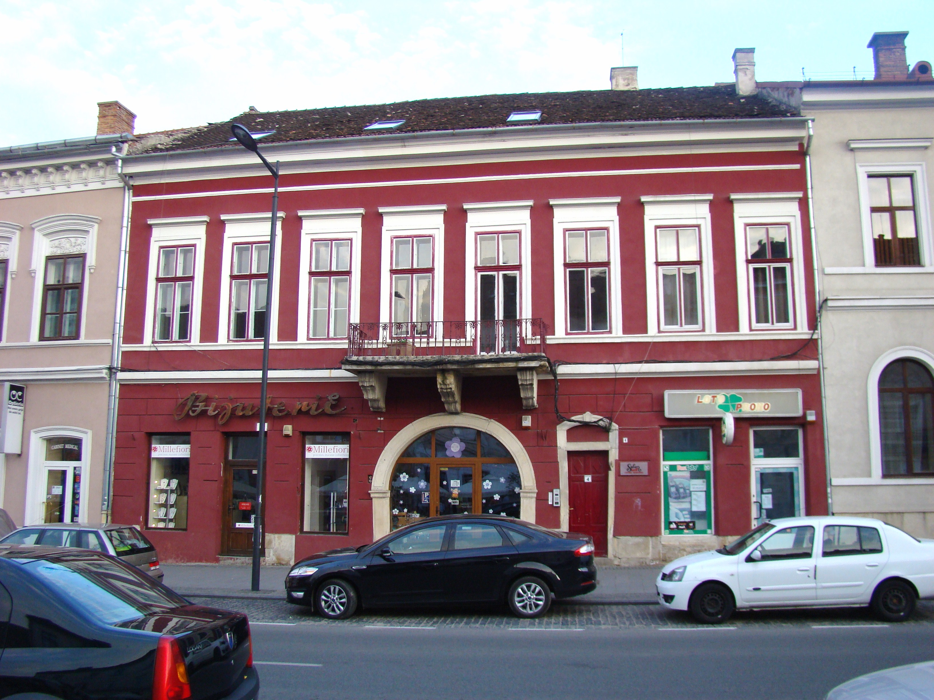 Clădire monument istoric, Bulevardul Eroilor, nr.4